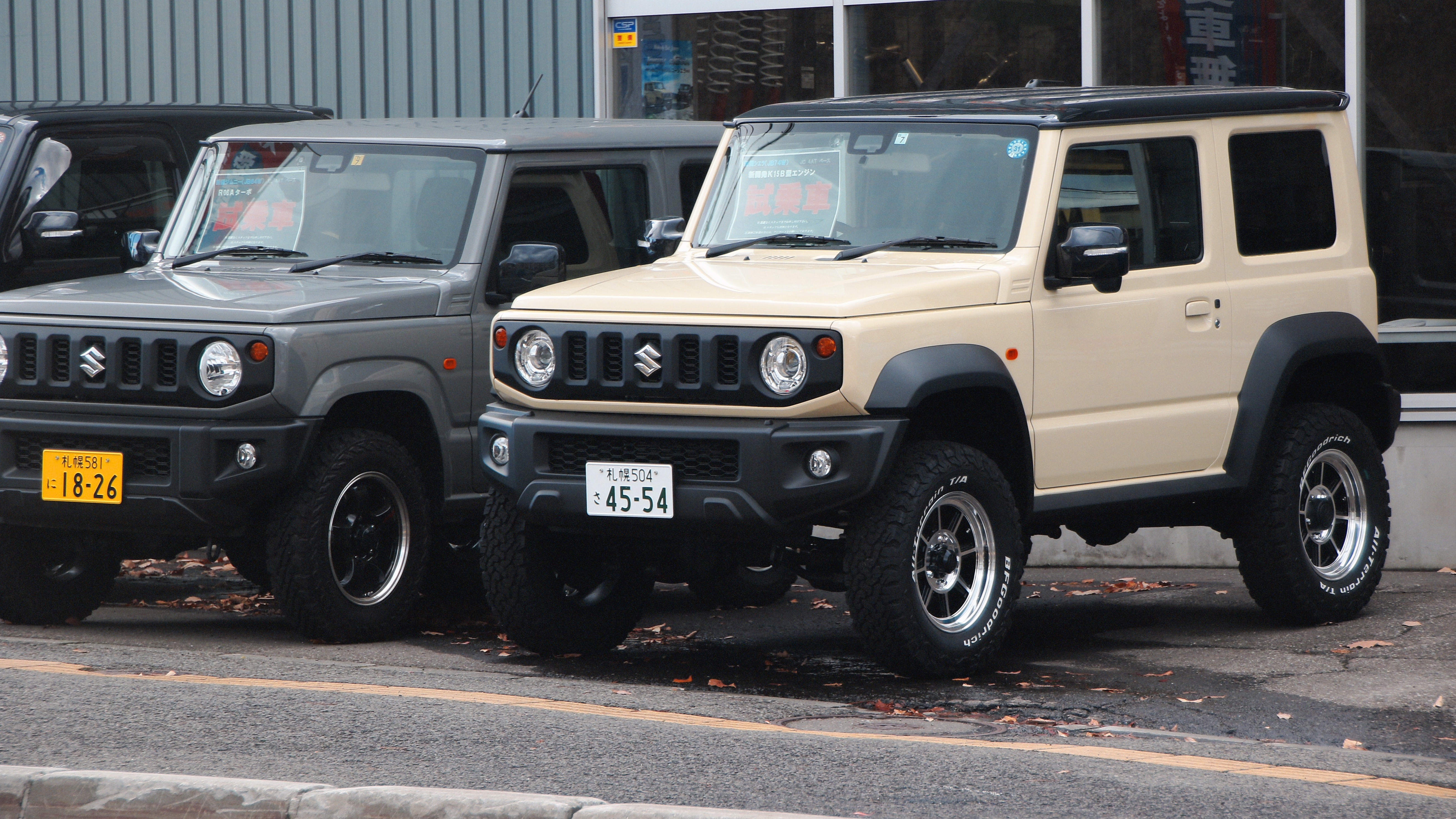 ちょっとシルエットが某Gクラスっぽいのが難点ですが、日本が誇る素晴らしい車です。